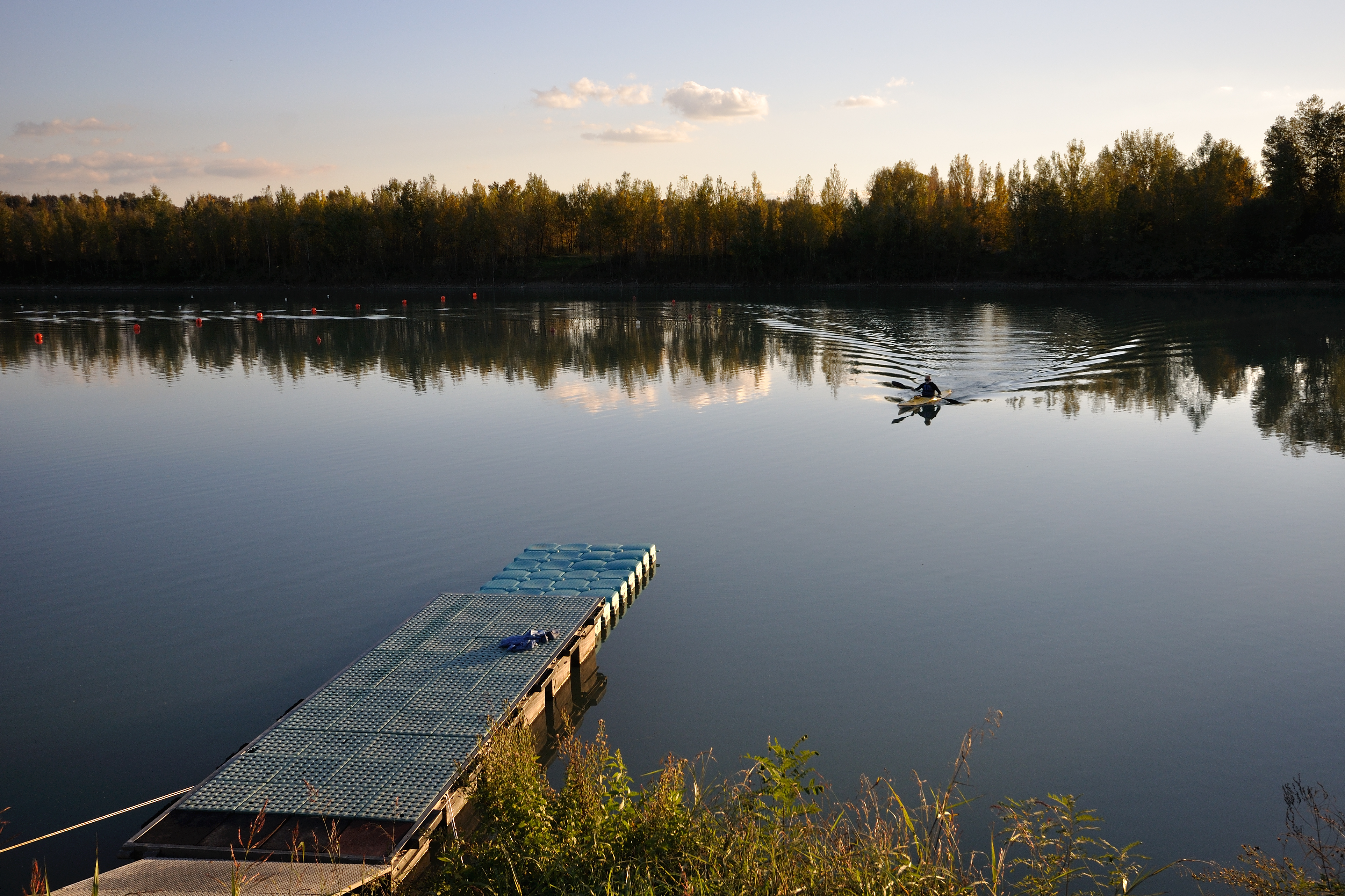 Casse di Espansione del Secchia - Campogalliano (MO) Italia - 29 Ottobre 2012